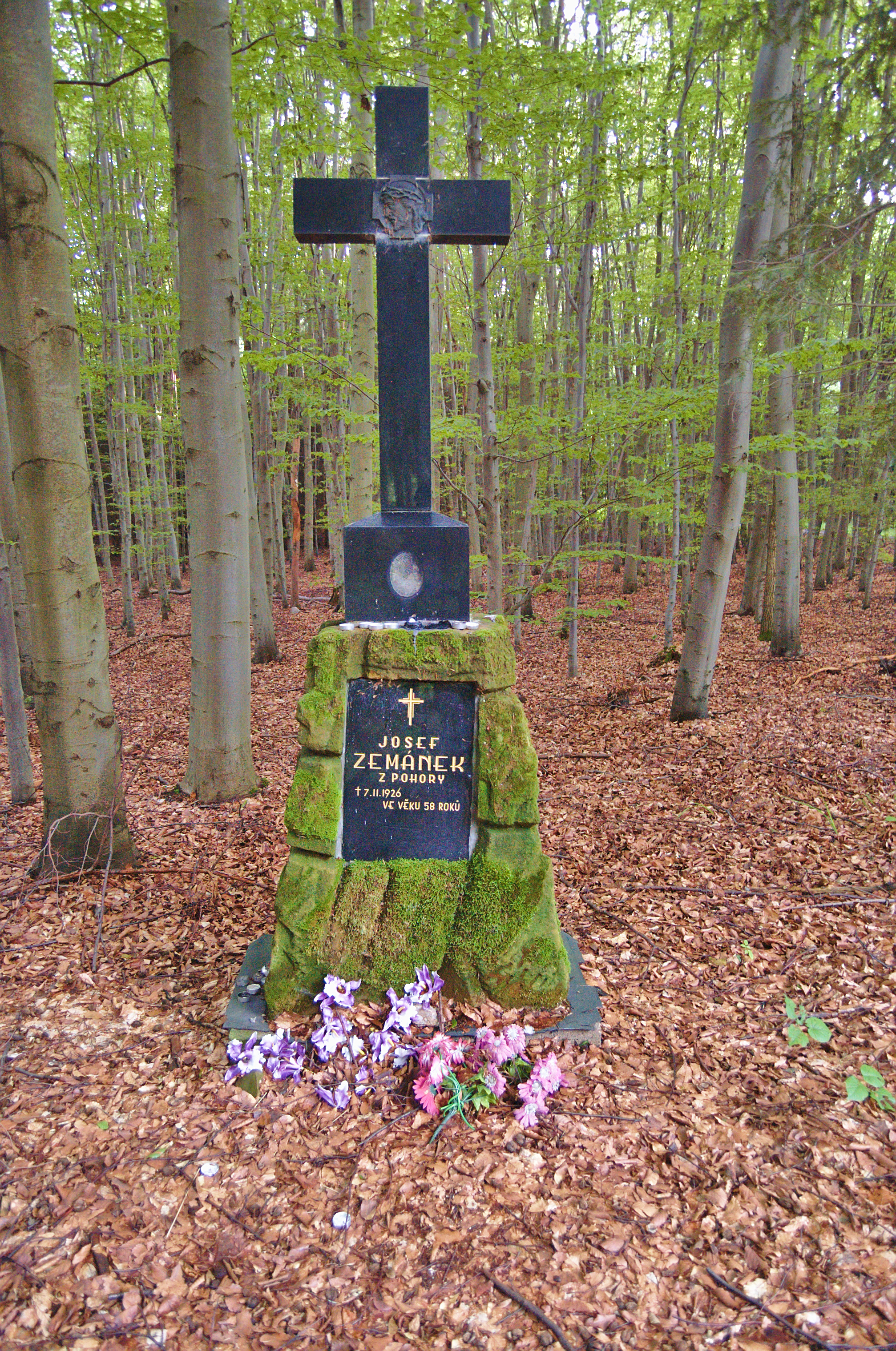 Kříž v lesích západně od Melkova, Okrouhlá, okres Blansko